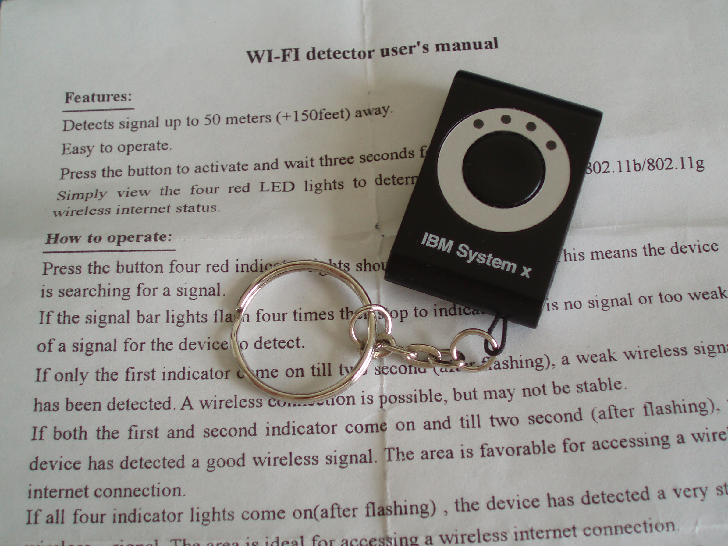 A Wi-Fi detector